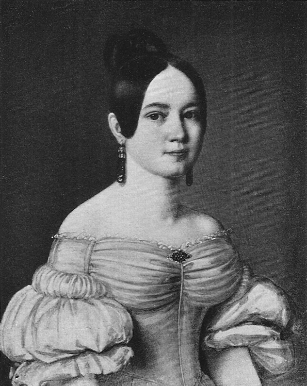 Amalie Vellnagel geb. Meurer [Gattin des Bankiers Vellnagel] (Elfenbeinminiatur 90×72 mm)